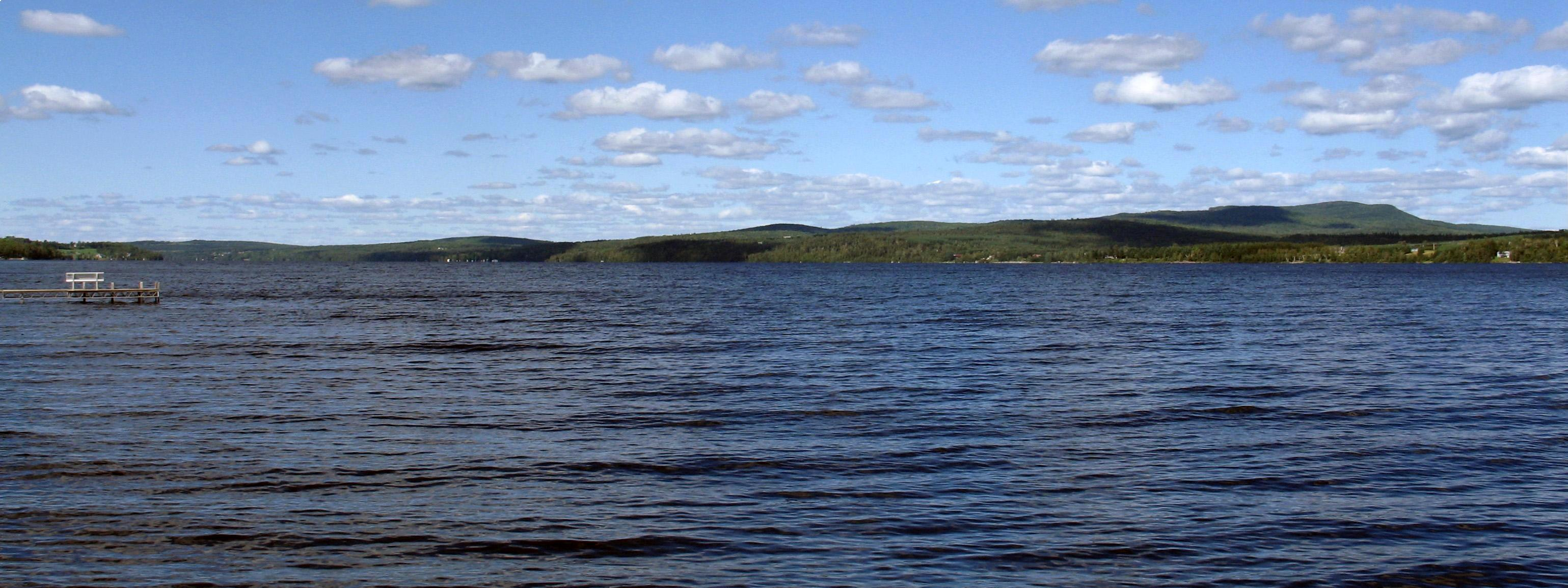 Le Lac Mégantic, à Piopolis, Québec.